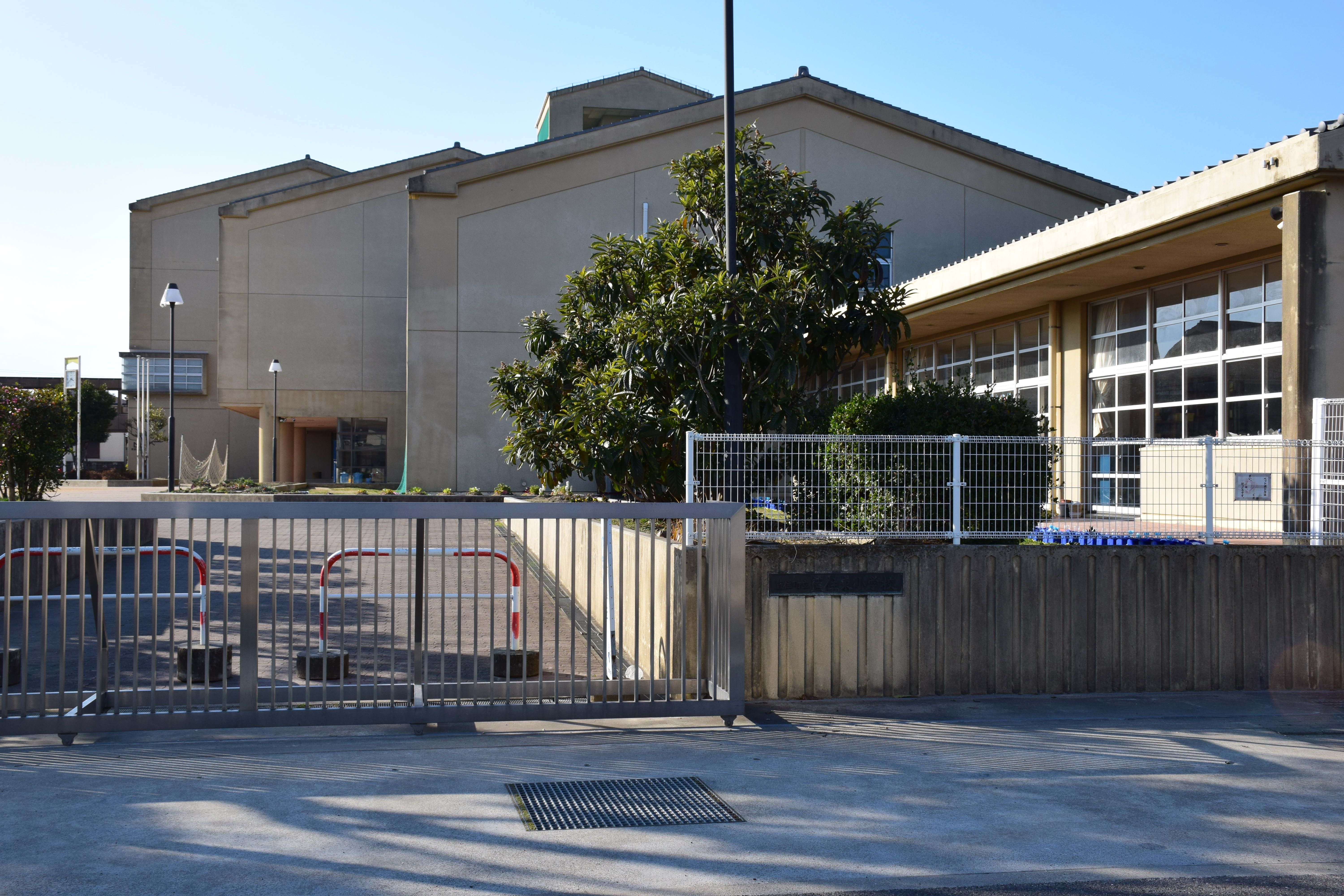 藍住町立藍住東小学校